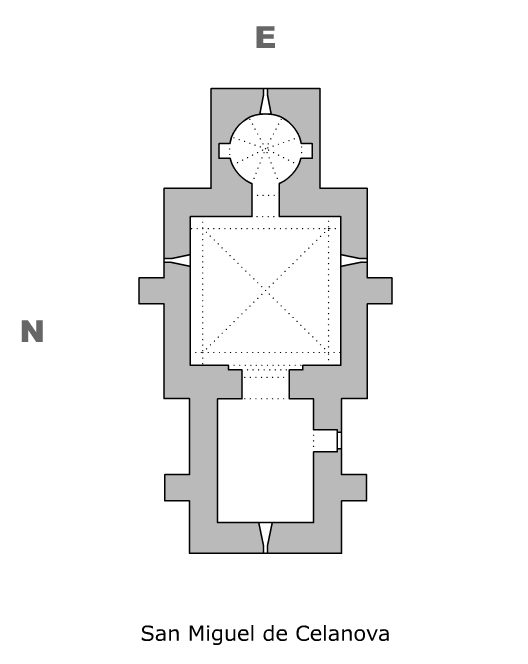 Planta de San Miguel de Celanova